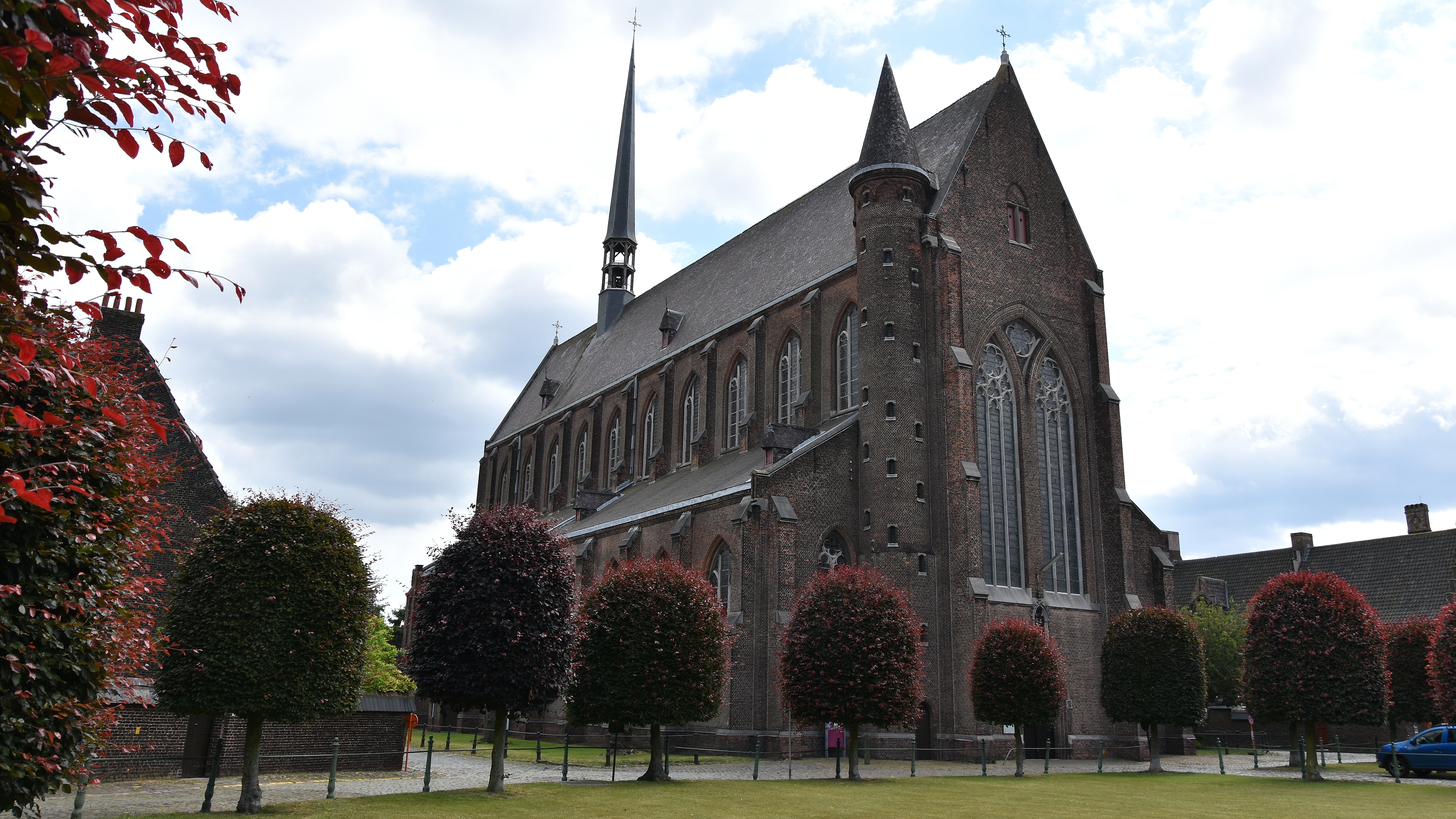 Groot Begijnhof Sint-Amandsberg 7-07-2019 13-40-32 This photo of immovable heritage has been taken in the Flemish Region